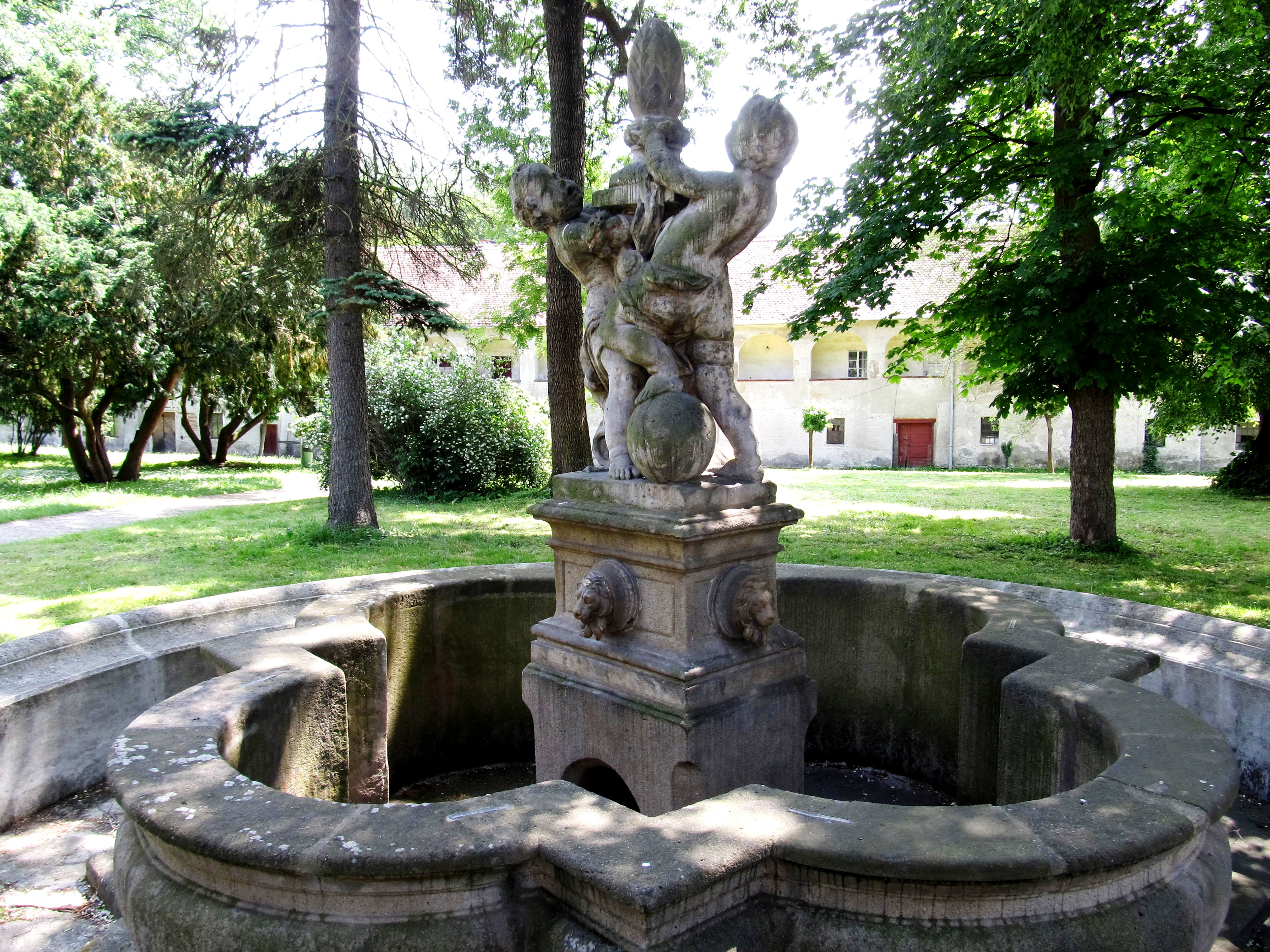 Tovačov zámek